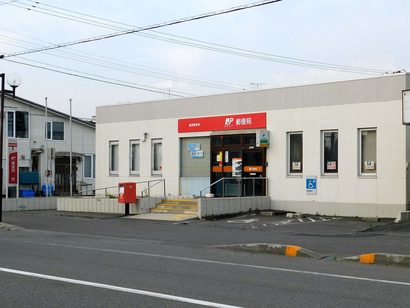 北海道天塩郡豊富町にある豊富郵便局局舎外観